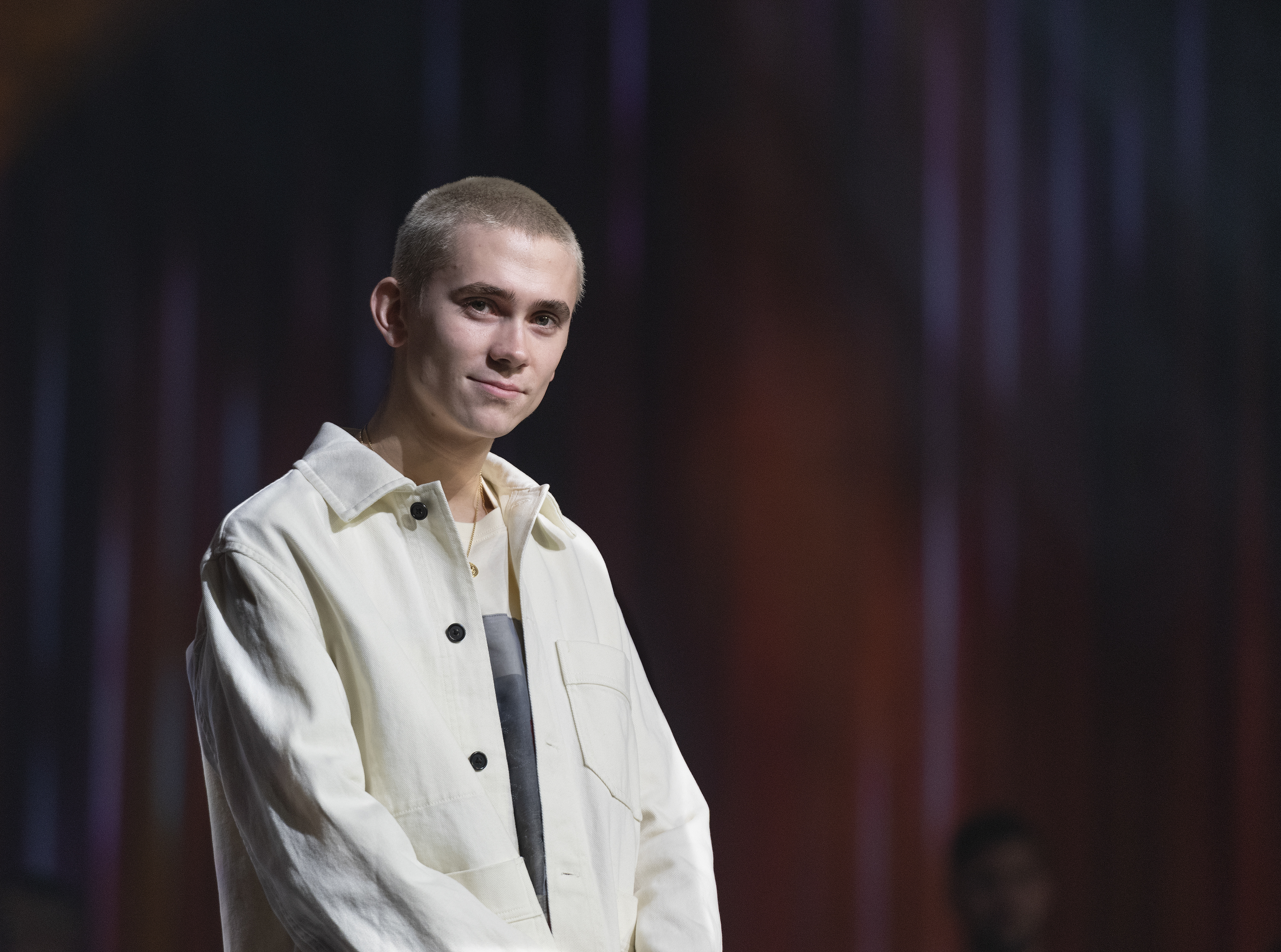 Felix Sandman Melodifestivalen 2020 Linköping presskonferensen